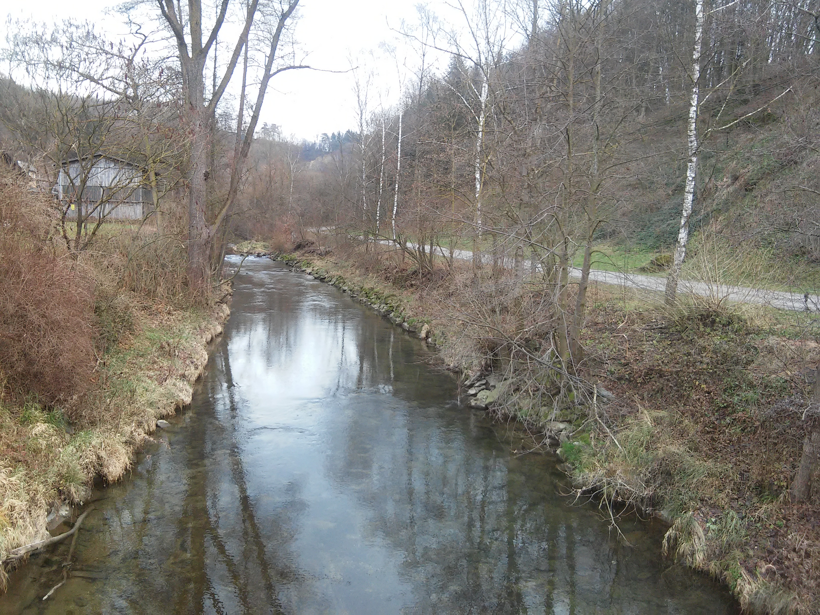 Die Mank in St. Leonhard am Forst im Ortsteil Gassen vom Ortsteil Thal kommend